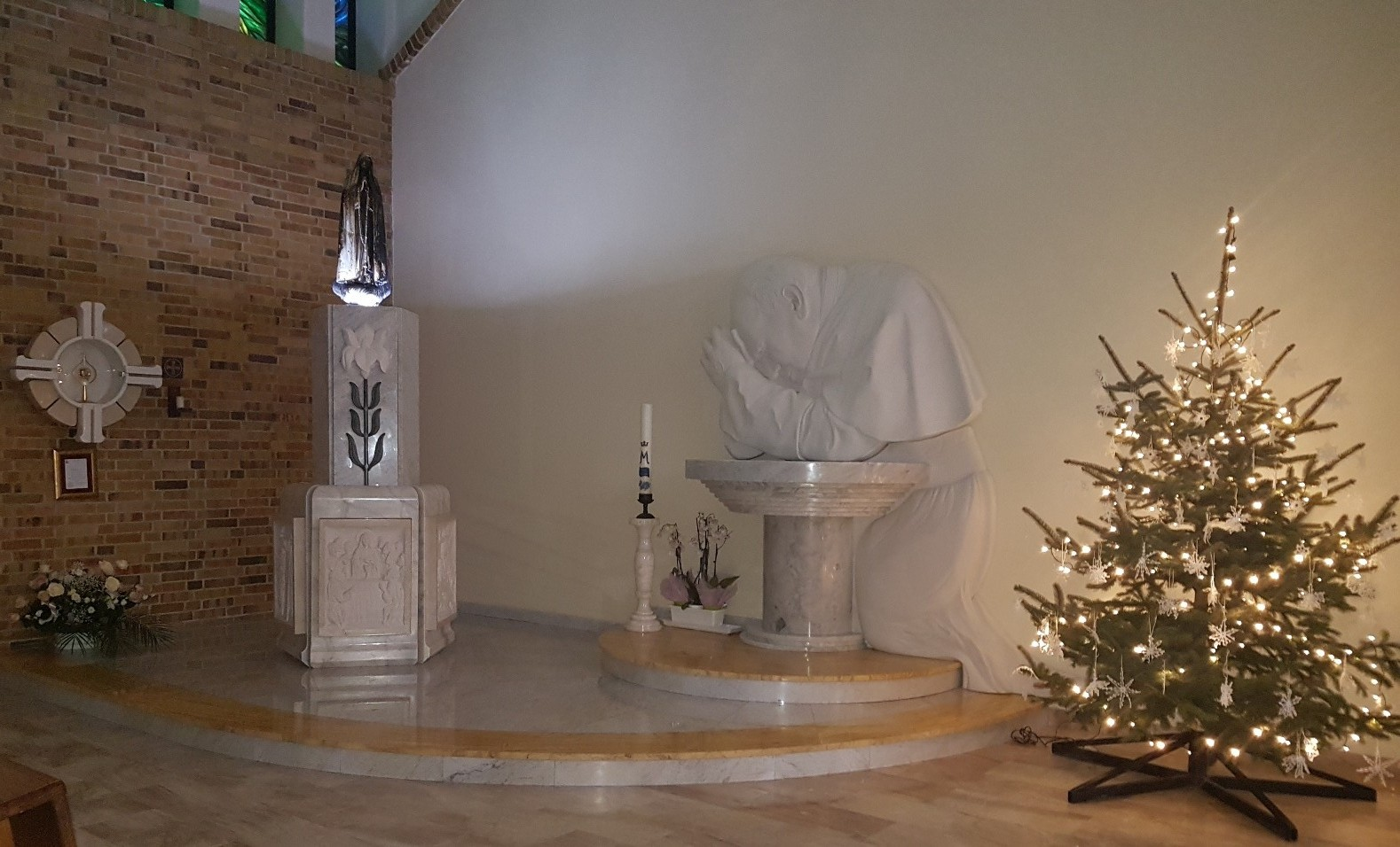 Boże Narodzenie 2017